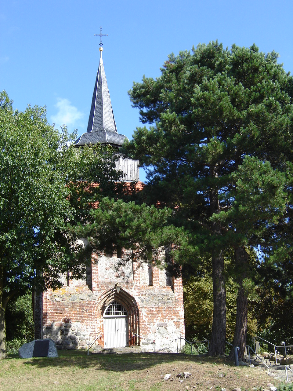 St. Jacobuskirche in Zirchow auf der Insel Usedom, Mecklenburg-Vorpommern, Deutschland